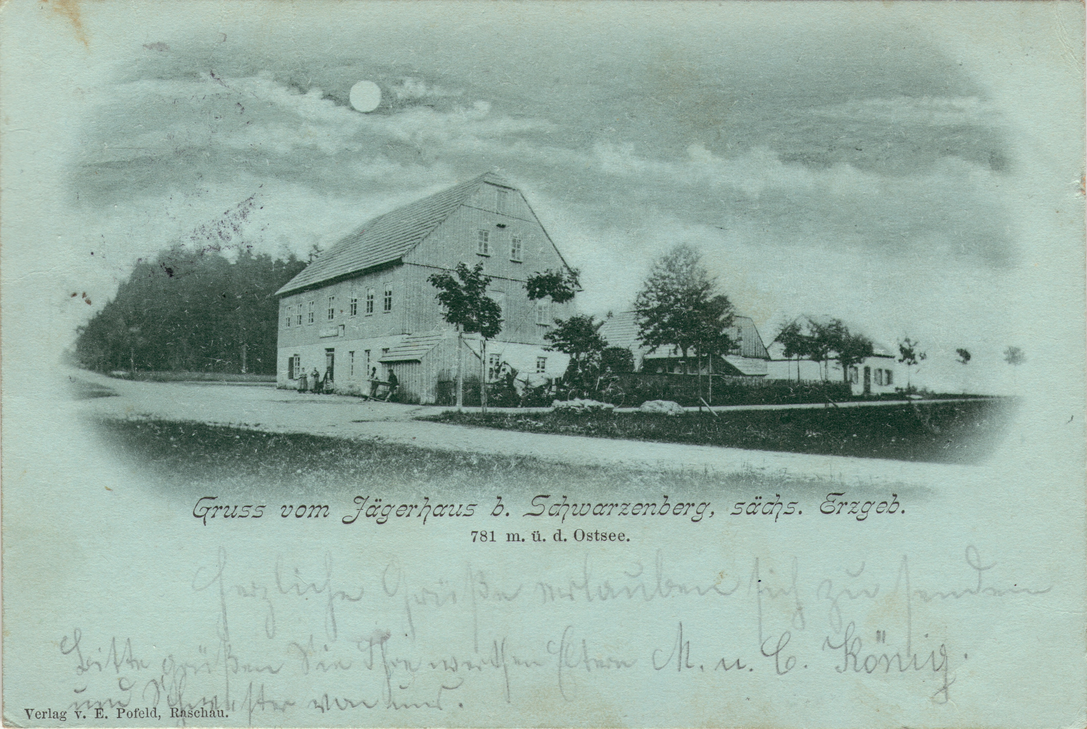 Jägerhaus (Schwarzenberg) ist ein etwa 780 Meter hoch gelegener Wohnplatz …